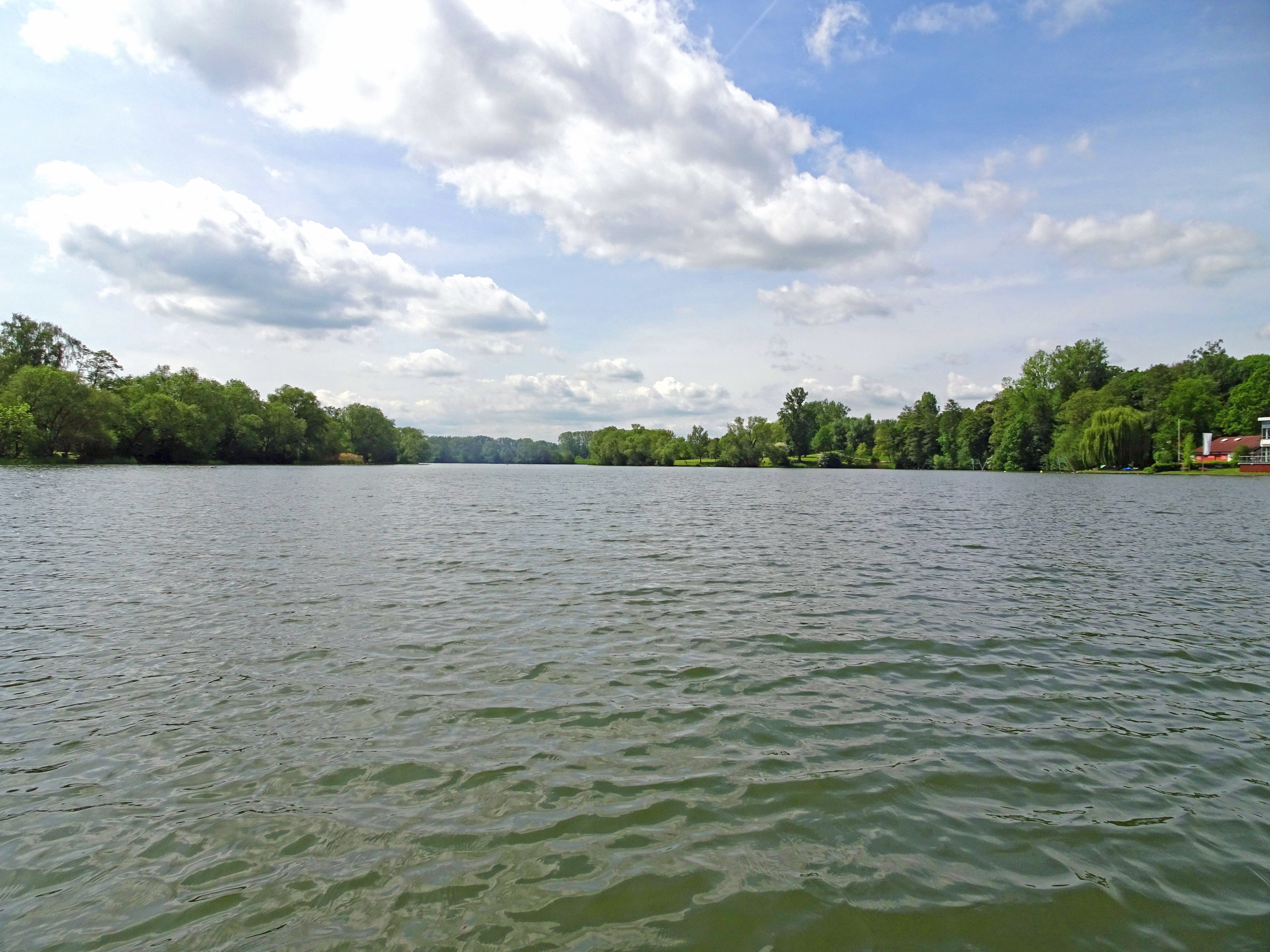 Blick auf den Göttinger Kiessee